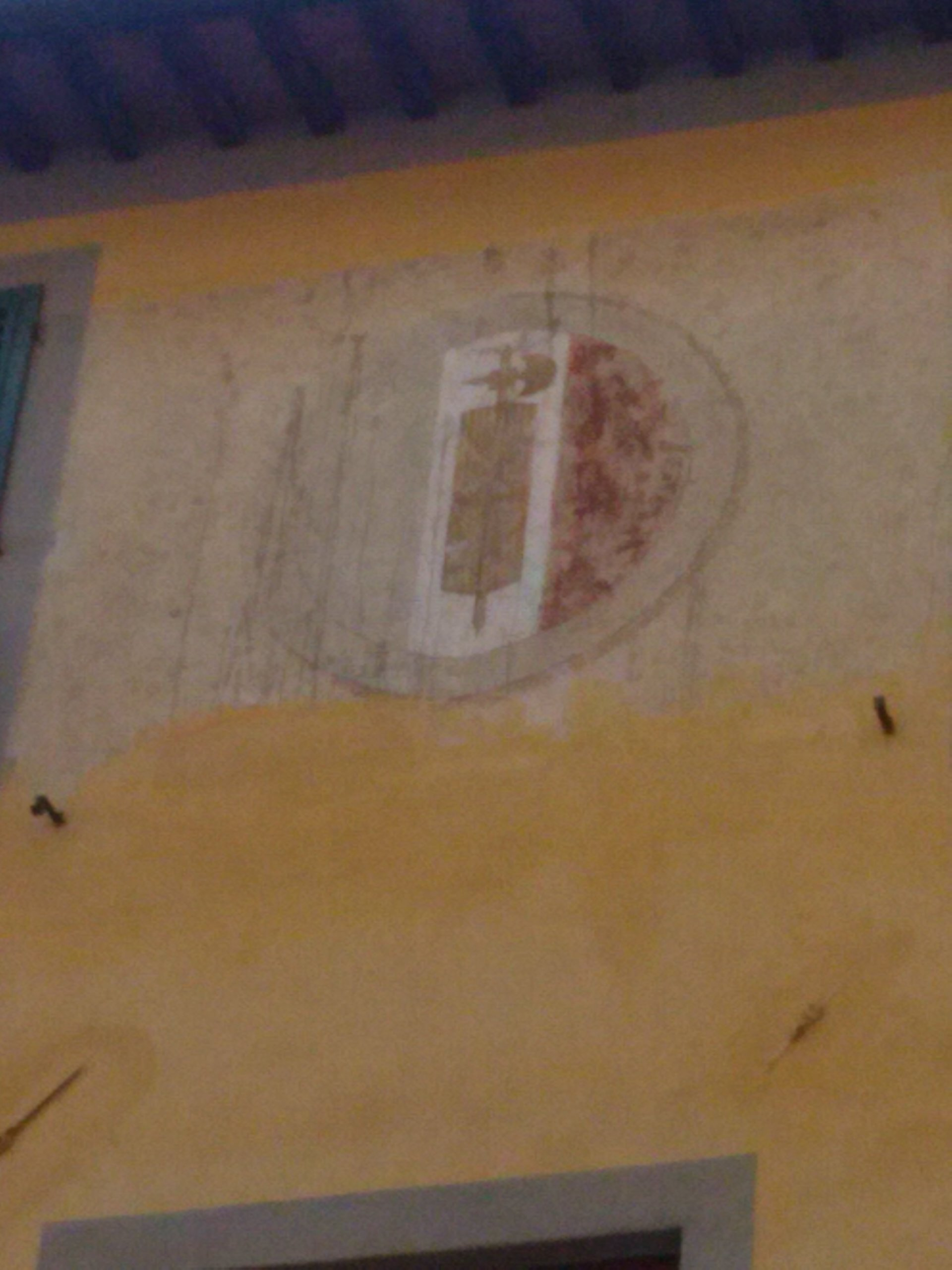 stemma fascista